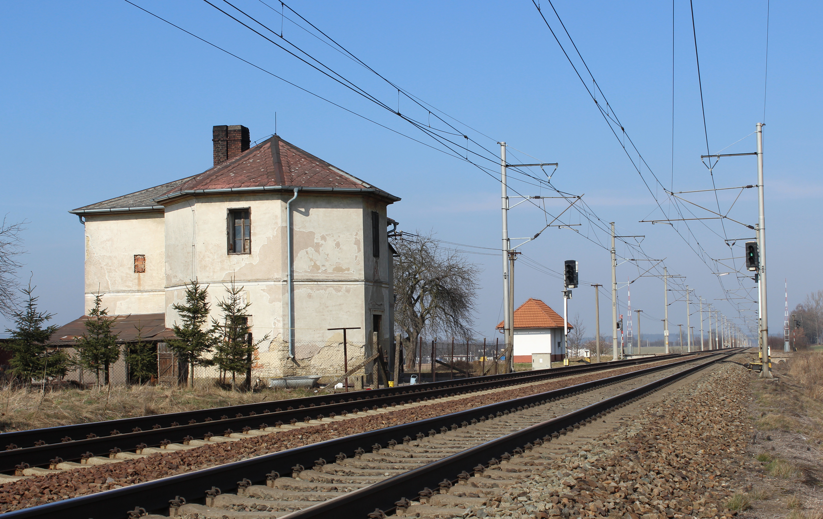 Původní staniční budova dávno zaniklé železniční stanice Lotschnau v dnešním Moravském Lačnově s osmibokou vodárnou. Zbourána v roce 2016.